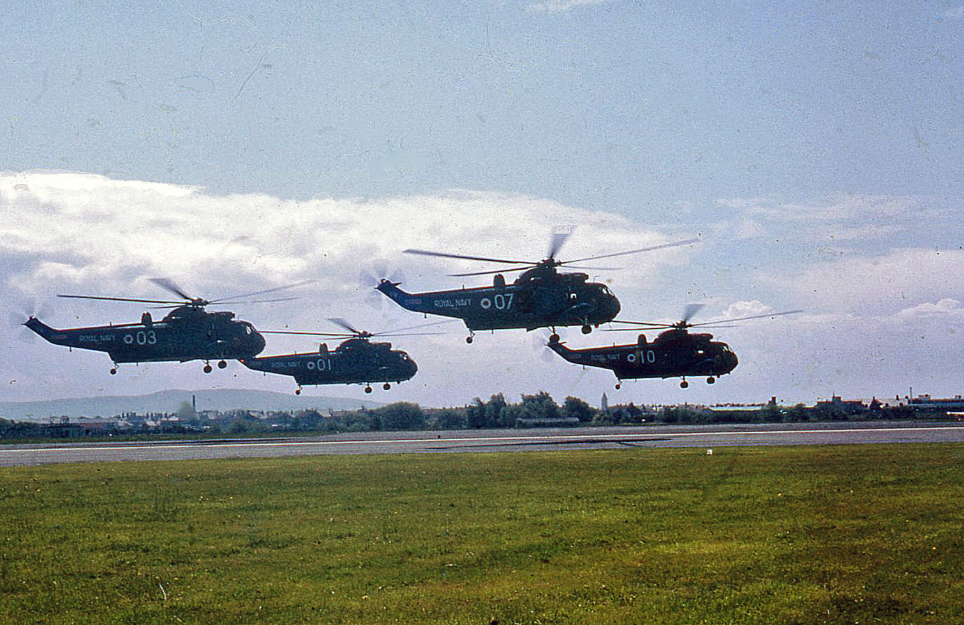 Sea Kings, Prestwick, 1972